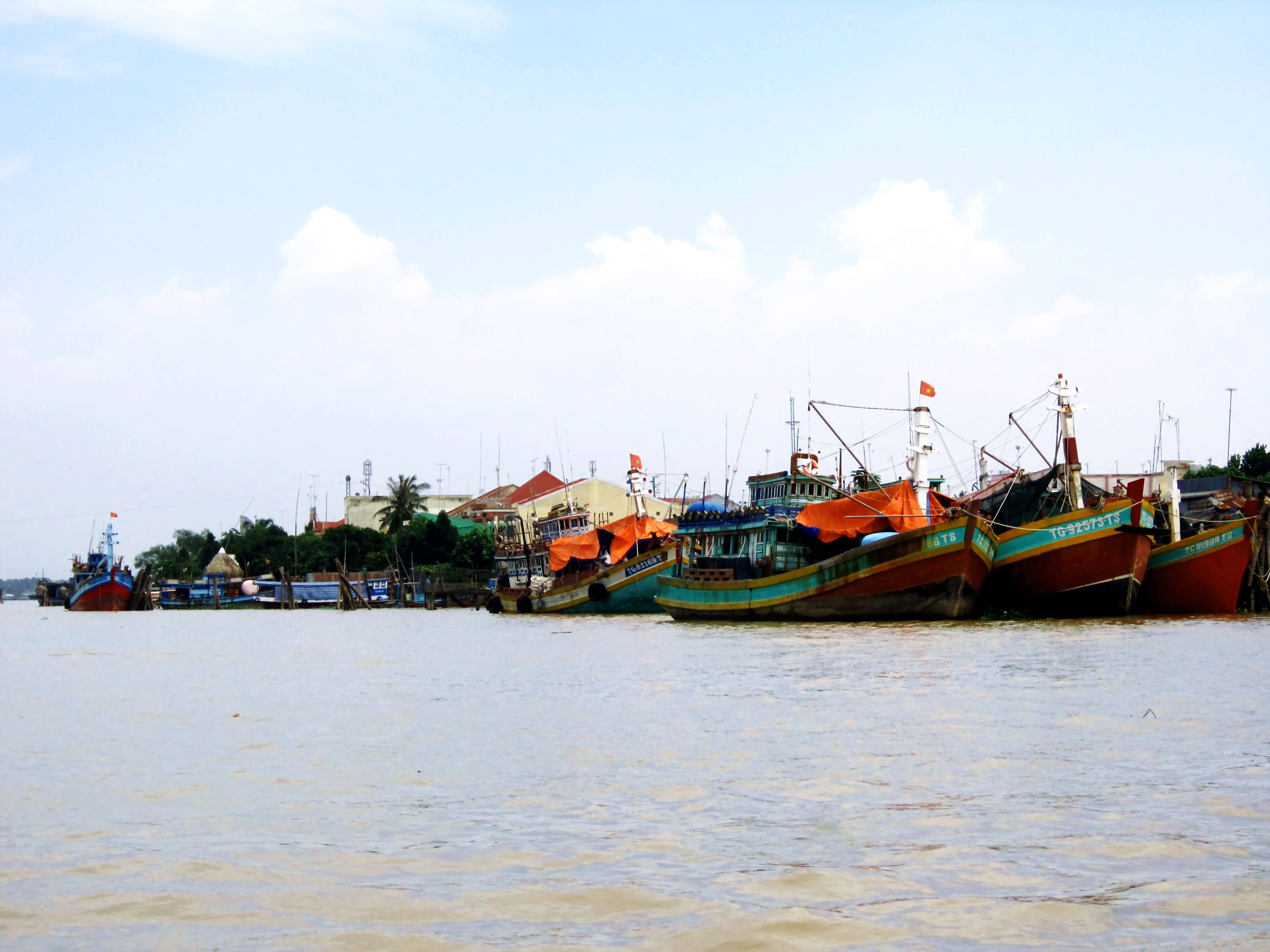 Bến tàu đánh bắt thủy sản ở phường Tân Long, TP Mỹ Tho, Tiền Giang, Việt Nam.